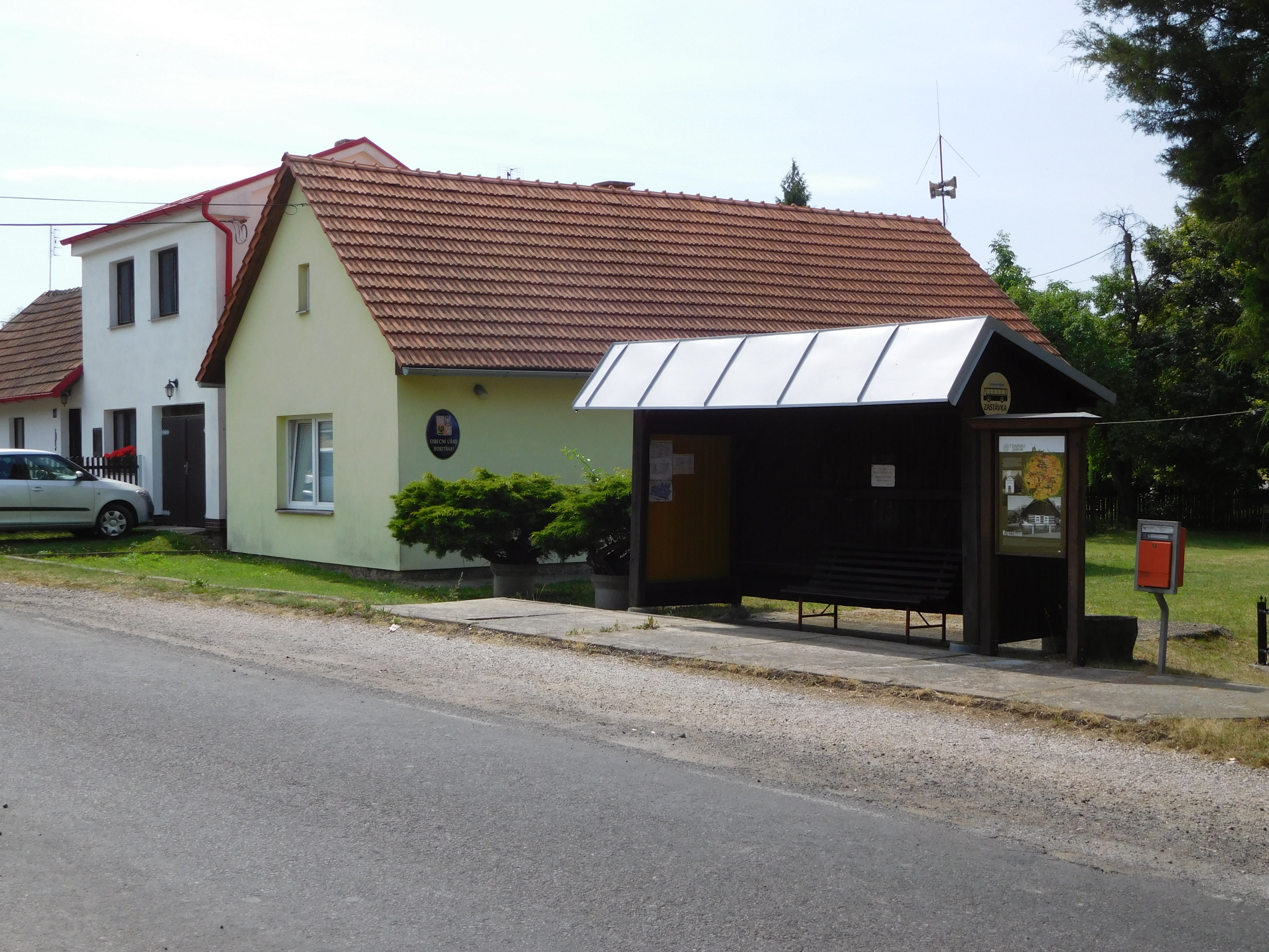 Horní Rokytňany - obecní úřad